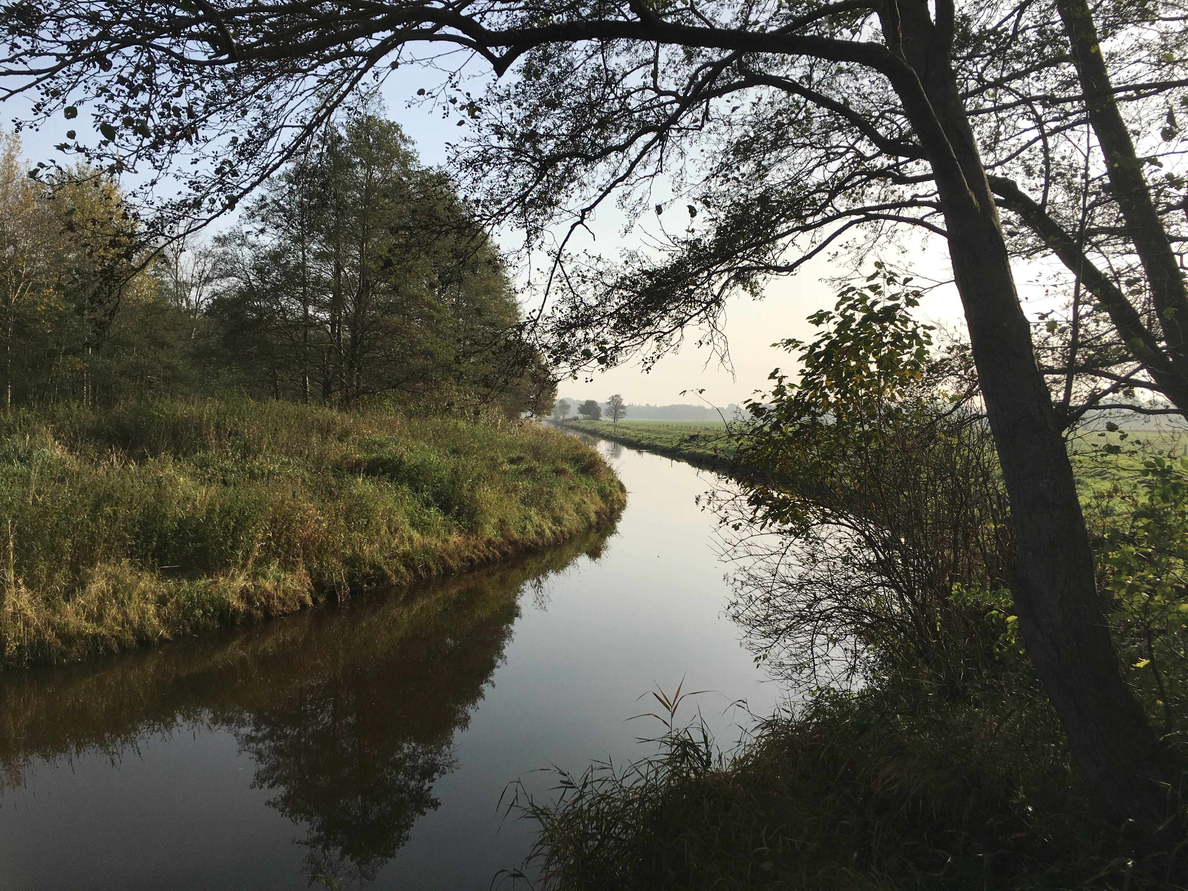 Borgbeekkanaal bi Bredenwisch